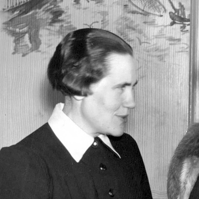 Från årsmötet i Akademiskt bildade kvinnors förening, från vänster Stockholmskretsens ordförande fil. dr. Gertie Söderberg och ordföranden i centralstyrelsen docent Asta Kihlbom.